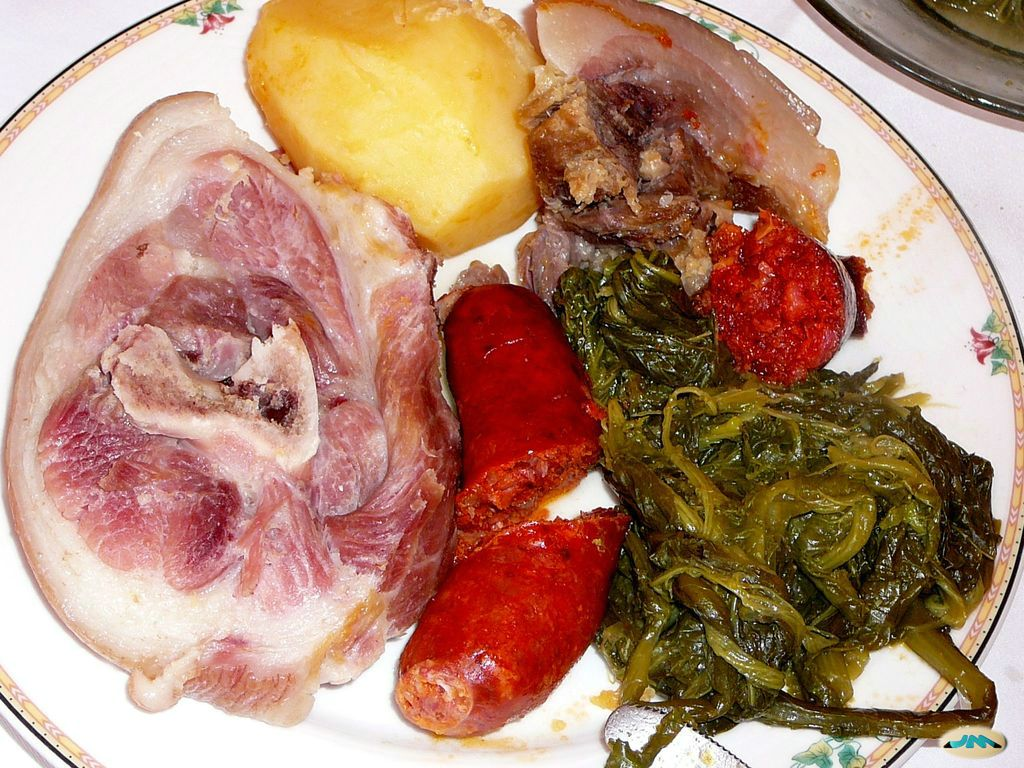 Cocido galego. Galicia (Spain) Un primer plato completito..con su lacón, cacheira, grelos, patata y los chorizos, casero y cebollero.... Y, a partir de ahí, cada uno repite lo que quiera... Todo ello regado con un buen Mencía